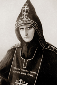 Фотография схимонахини Софии